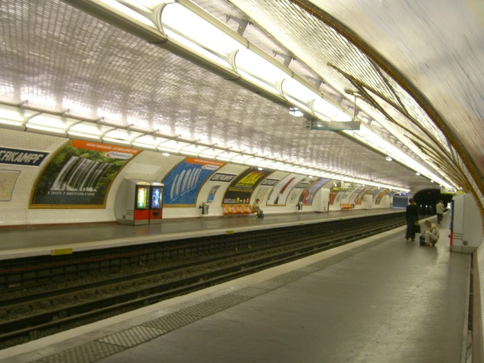 Oberkampf Paris